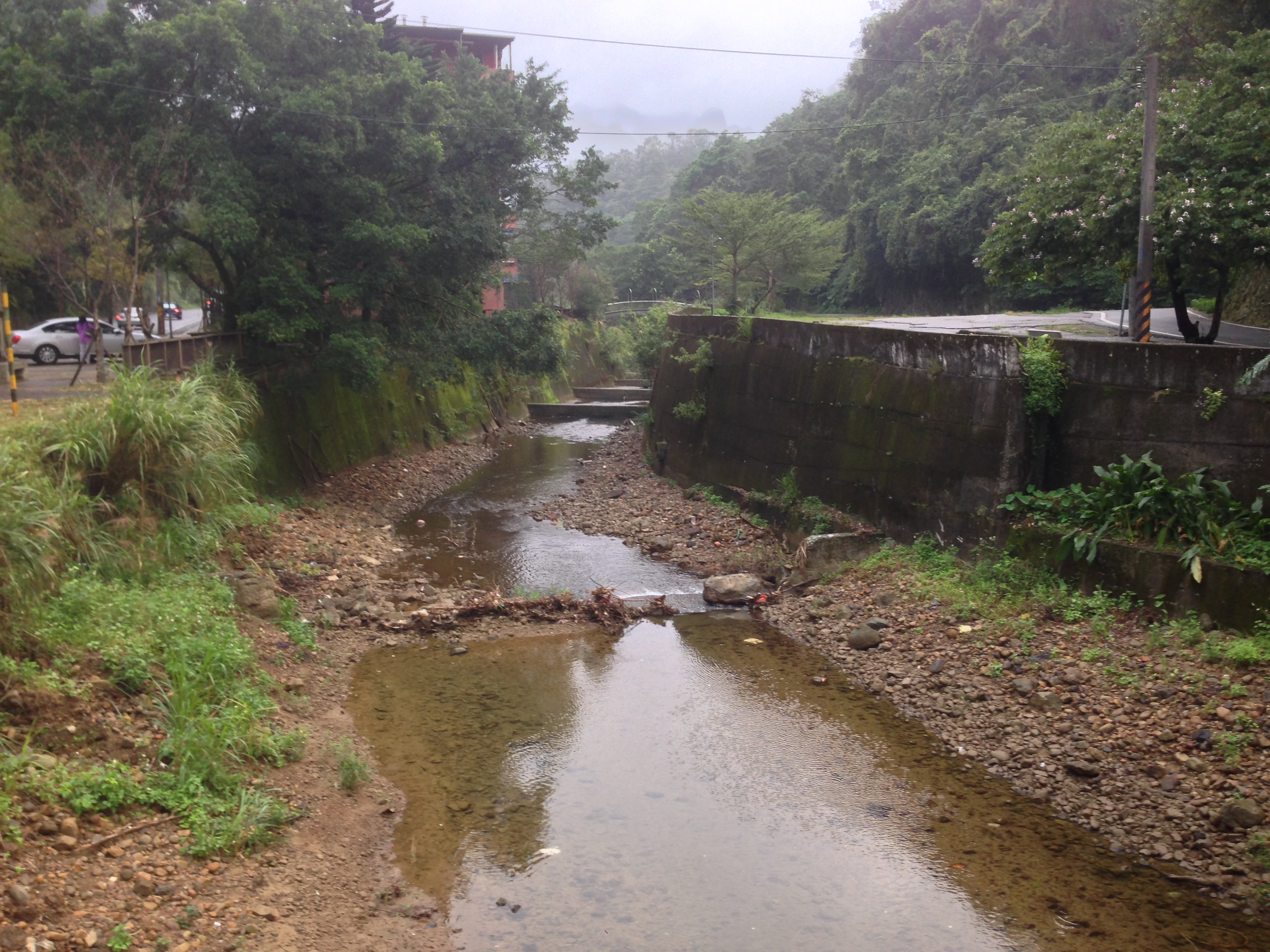 中文（台灣）: 石碇姑娘廟橋的永定溪